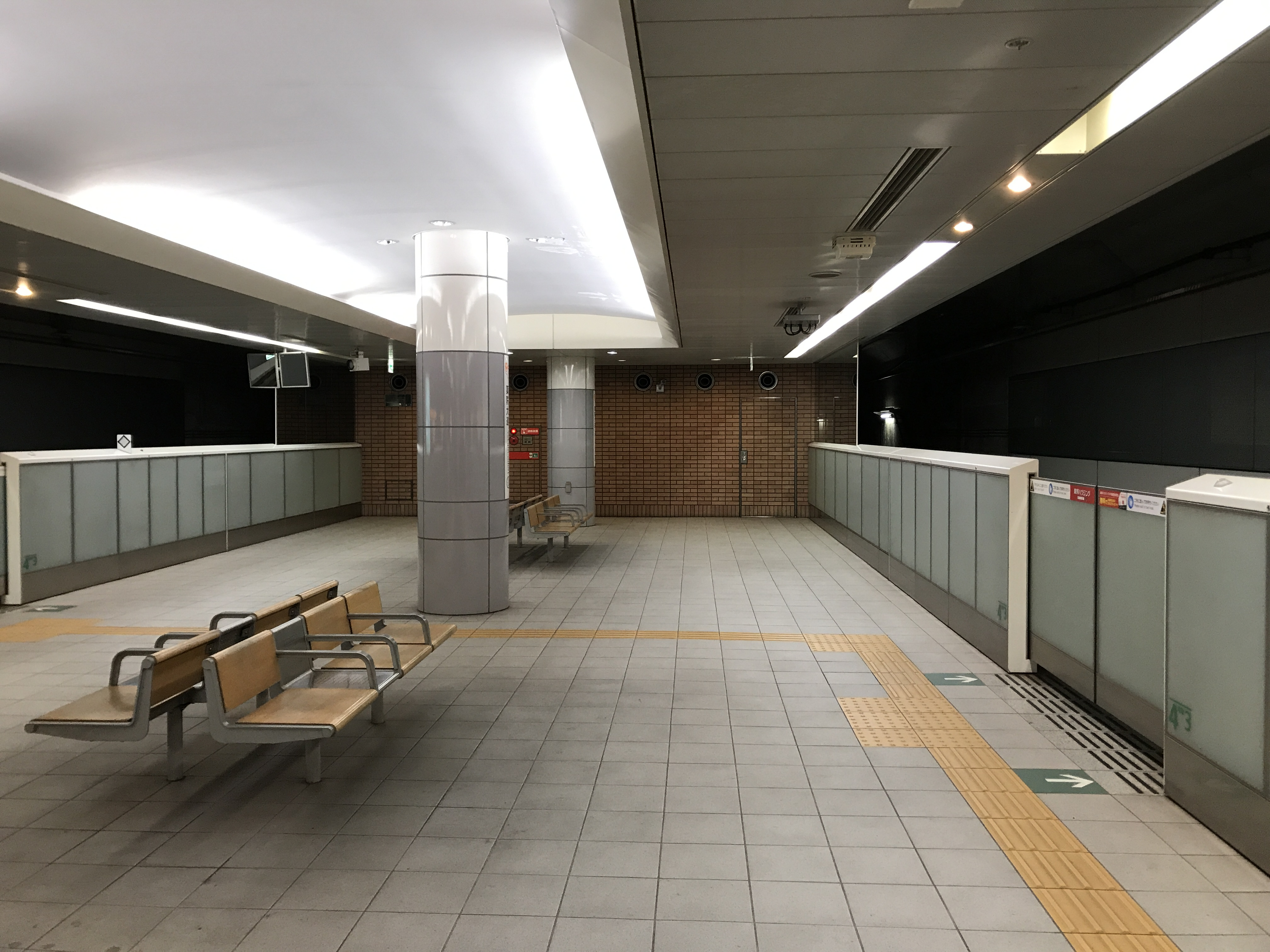 薬院大通駅のホーム